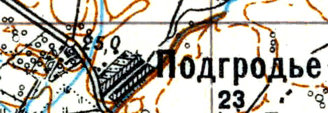 Топографическая карта Ленинградской области, квадрат Vc-29 (Батецкая), деревня Подгородье